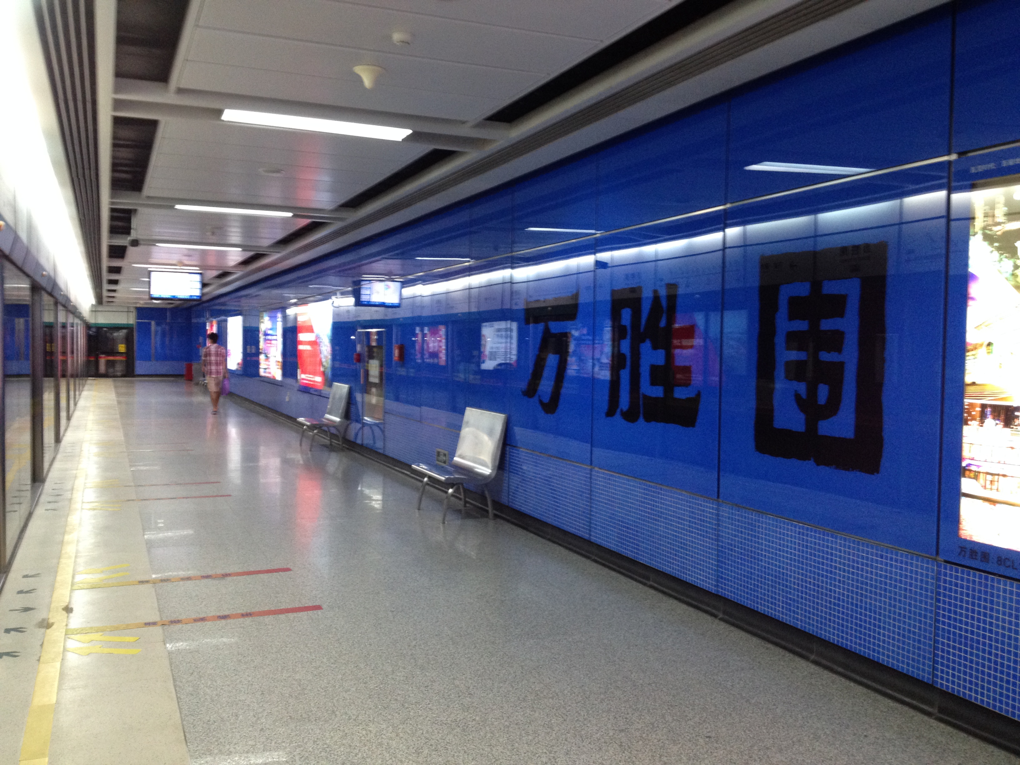 广州地铁8号线万胜围站月台